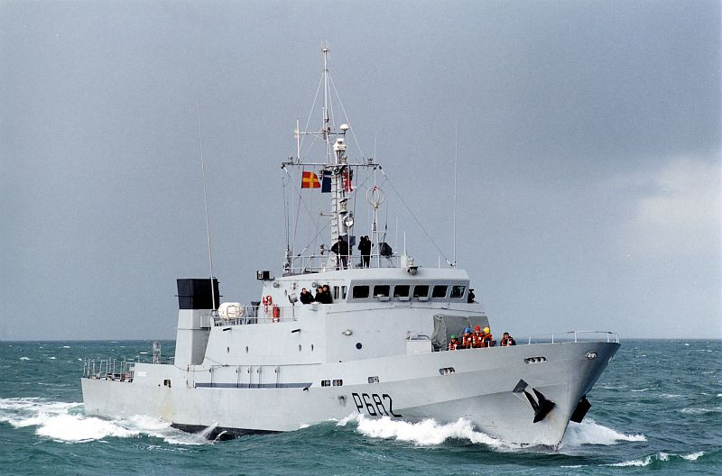 Patrouilleur P400 L'Audacieuse P682